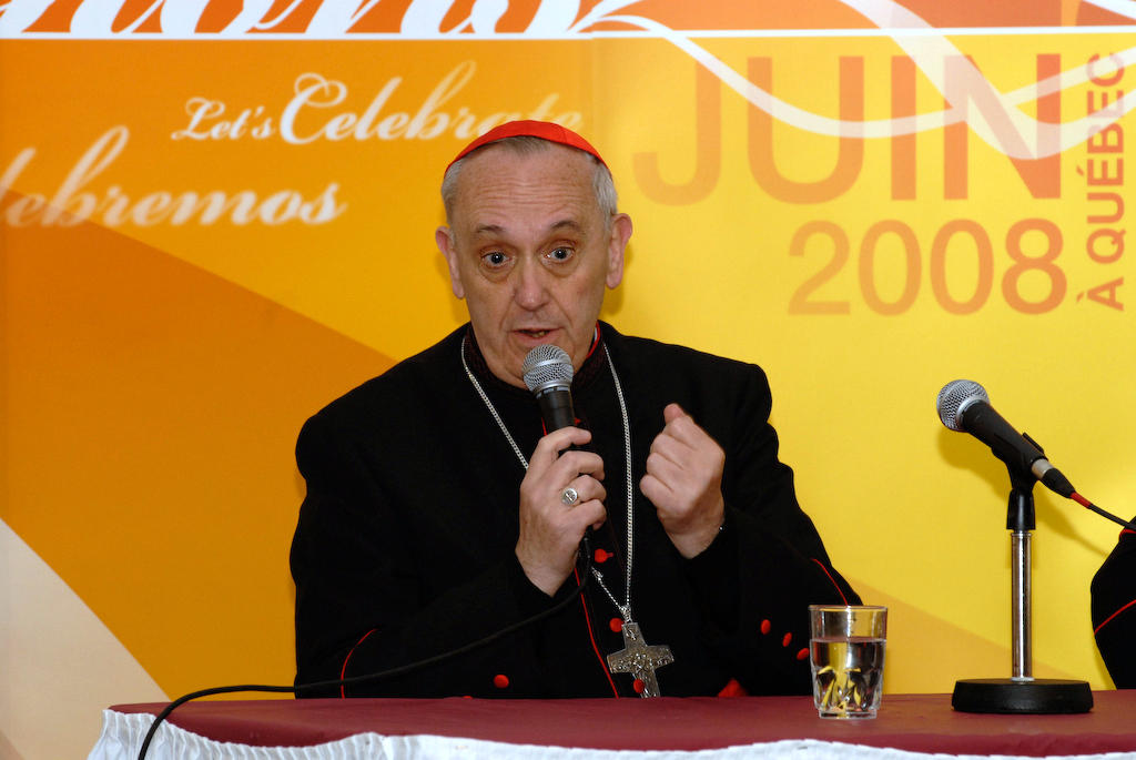 Le cardinal Bergoglio en conférence de presse à la suite de sa conférence au CEI 2008.